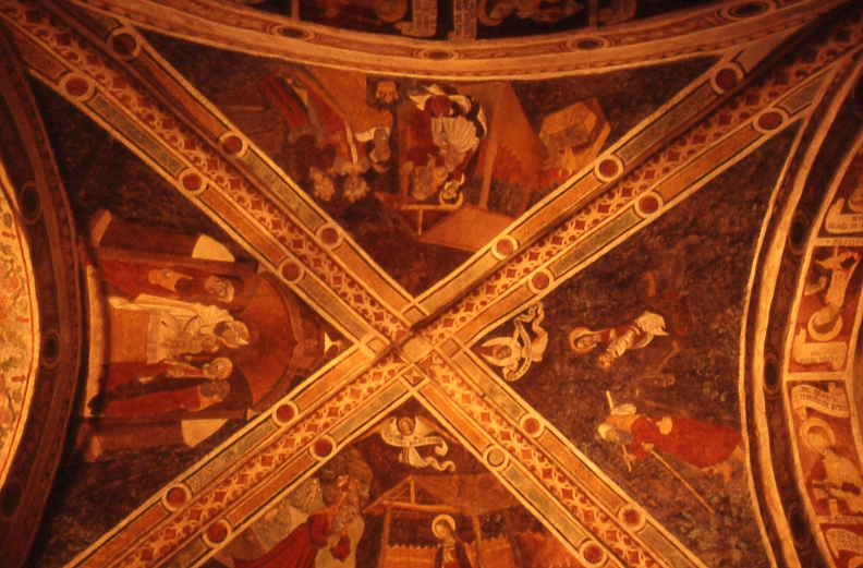 Autore: Federico Fiandro Il soffitto affrescato della chiesa di san Giorgio a Valperga (IT) Pubblico Dominio